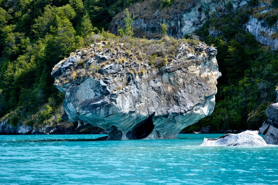 Capilla de Mármol This is a photo of a national monument in Chile: 174